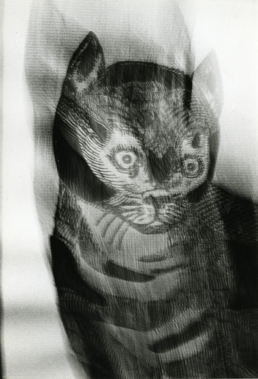 Serie fotografica : Milano, 1981 / Paolo Monti. - Stampe: 3 : Positivo b/n, gelatina bromuro d'argento/ carta, 24x30. - ((Al verso delle stampe manoscritti i numeri dei negativi corrispondenti (formato 35 mm) con indicazione del fotogramma: 3221/35, 3221/36, 3221/3[tagliato]; iscrizione didascalica con data manoscritta a matita: "Gatto mosso - 1981"; timbro a inchiostro con copyright: "© Copyright/ Credit to/ Paolo Monti/ Corso Sempione [...]/ Milano". - Sul coperchio della scatola iscrizione didascalica manoscritta a pennarello nero: "Gatti". - Confronta scheda 3221L34-38. - Fonte: Agenda di Paolo Monti: Nikon Leika 3001-/ Monti 1978 (1978-1982), presso Archivio Paolo Monti